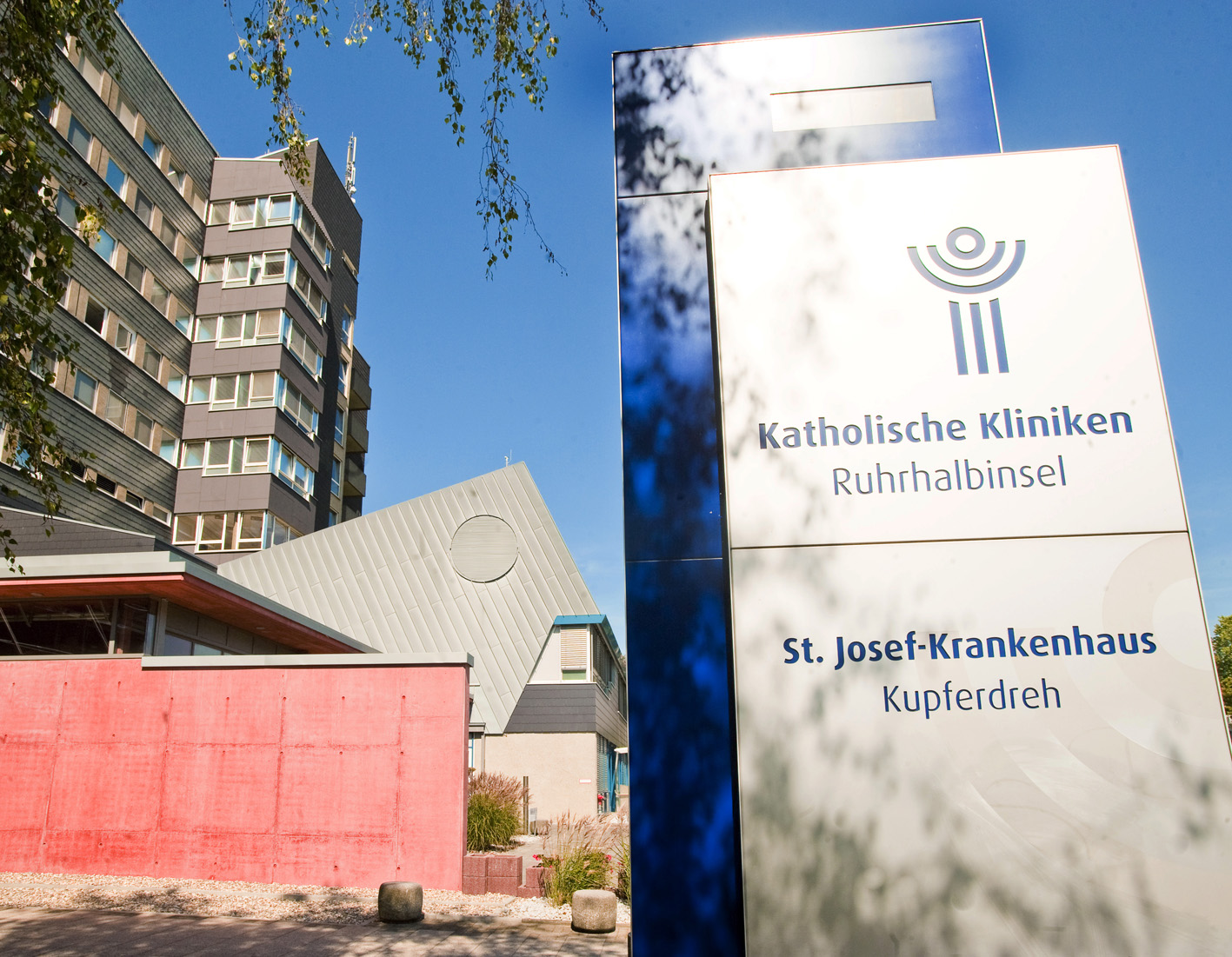 Außenansicht des St.-Josef-Krankenhauses Essen-Kupferdreh